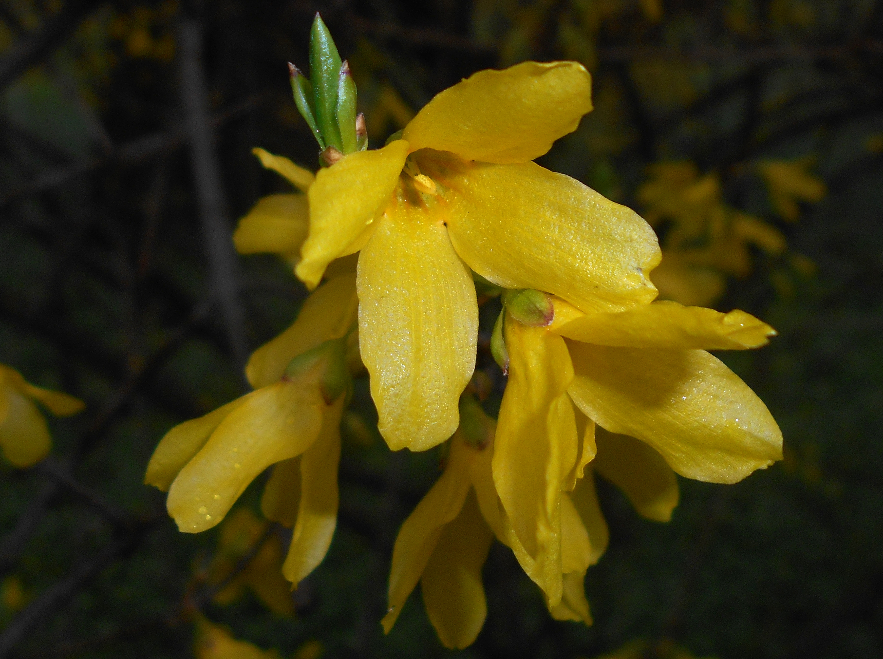 Forsycja pośrednia (Forsythia × intermedia), Ogród Saski w Lublinie